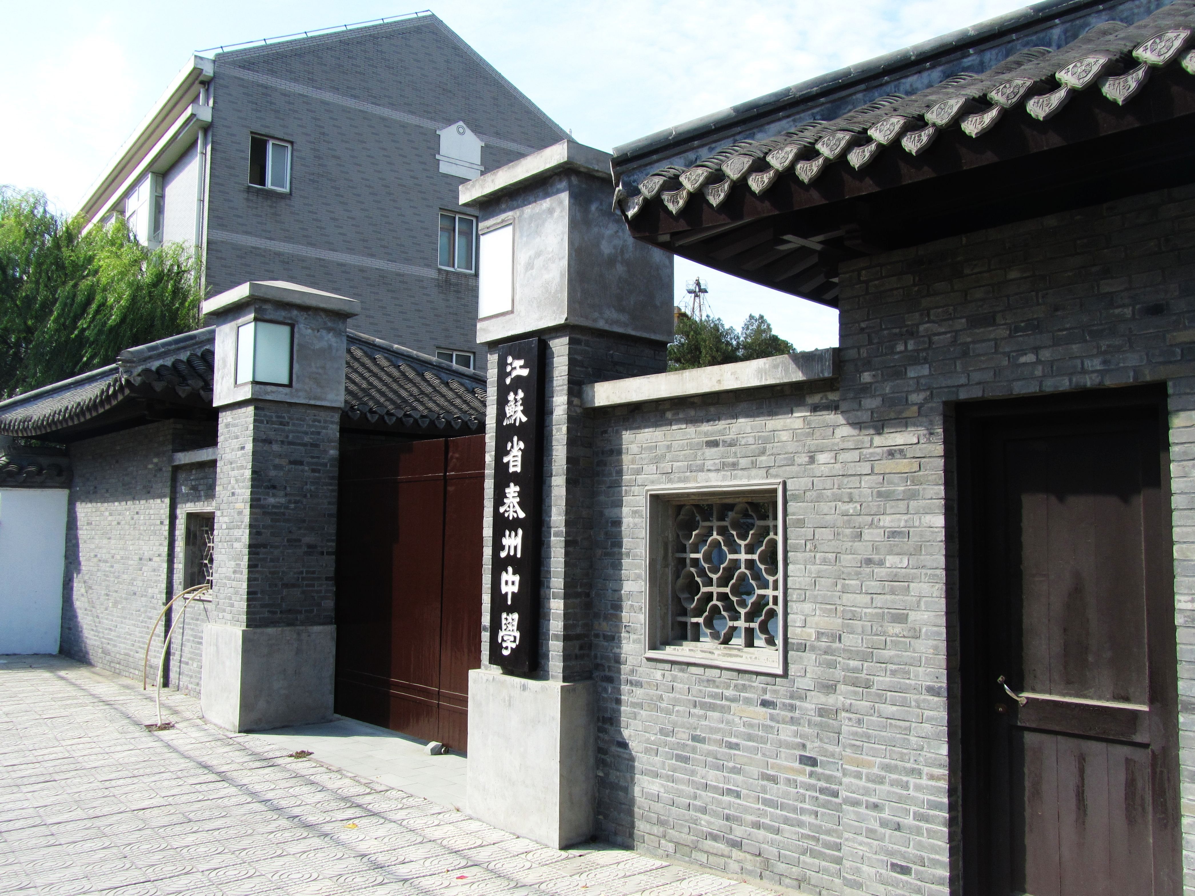 江苏省泰州中学老校门。